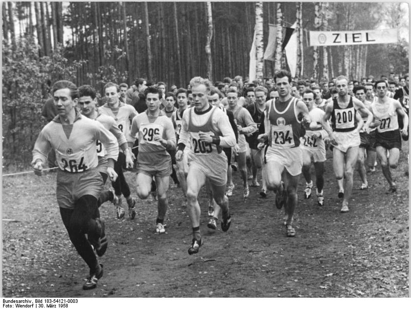 Berlin, Waldlaufmeisterschaften Zentralbild Wendorf Bey-L 30.3.1958 Berliner Waldlaufmeisterschaften in Friedrichshagen In Berlin-Friedrichshagen wurden am Sonntag, dem 30.3.58, die Berliner Waldlaufmeisterschaften 1958 entschieden. Diese Wettkämpfe waren für die Berliner die Generalprobe für die Mitte April in Zittau stattfindenden Deutschen Waldlauf-Meisterschaften. UBz: Start der Männer über 2500 m. Sieger wurde Siegfried Valentin (Star Nr. 205) .